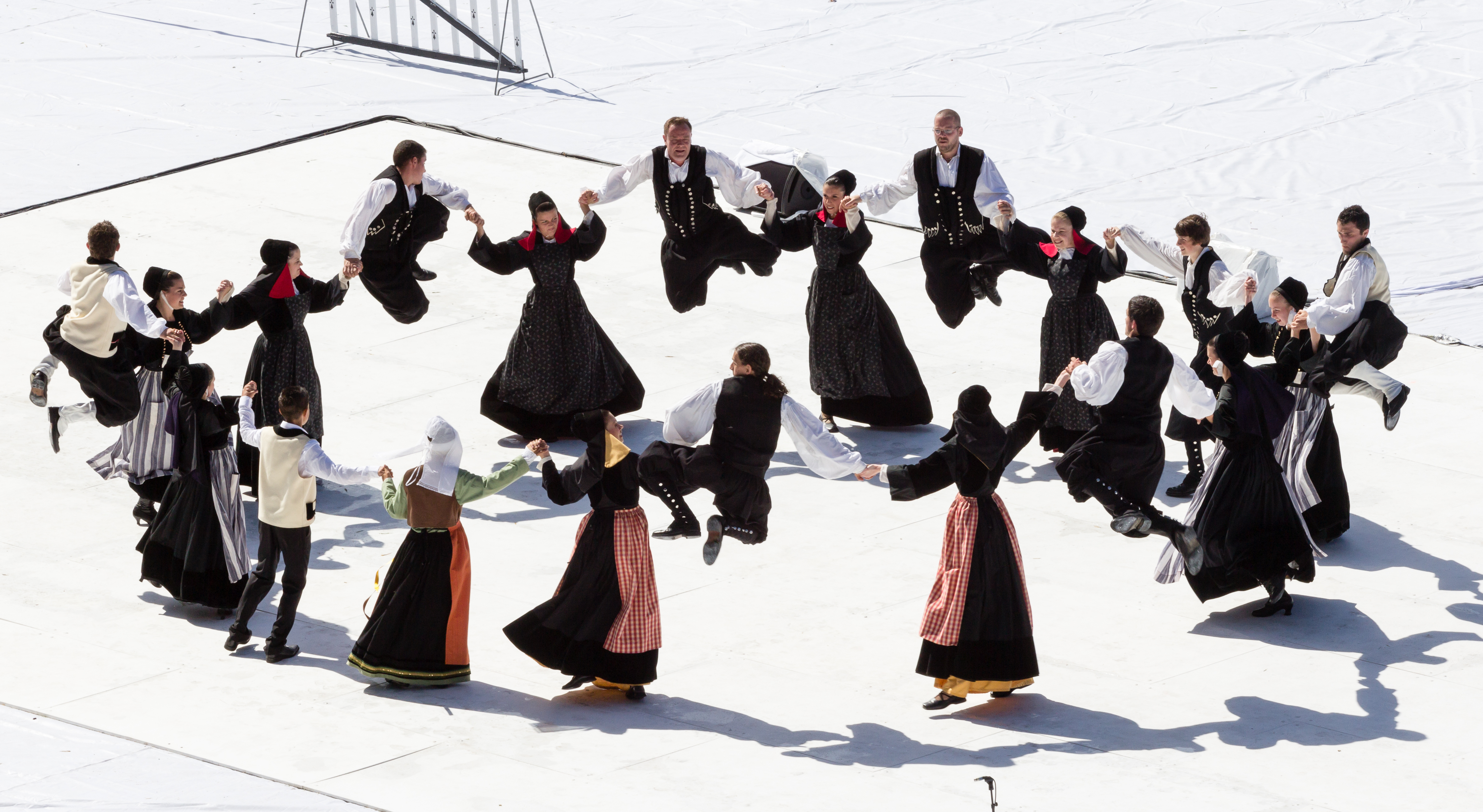 FIL 2012 - Arrivée de la grande parade des nations celtes - Kerlenn Pondi